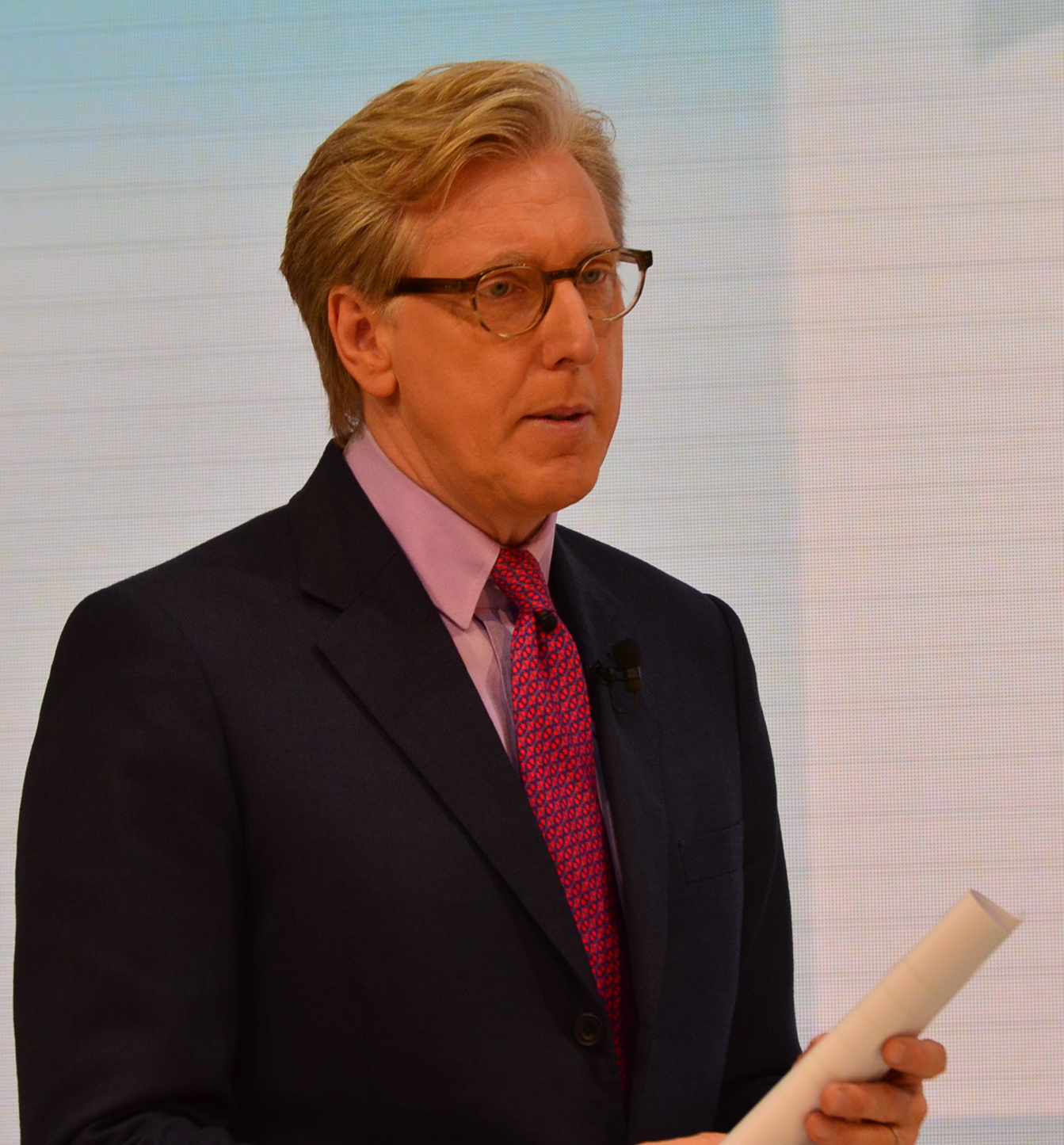 WP:Fotoprojekt zur Bundestagswahl 2013 in Berlin in den Parteizentralen und dem ZDF